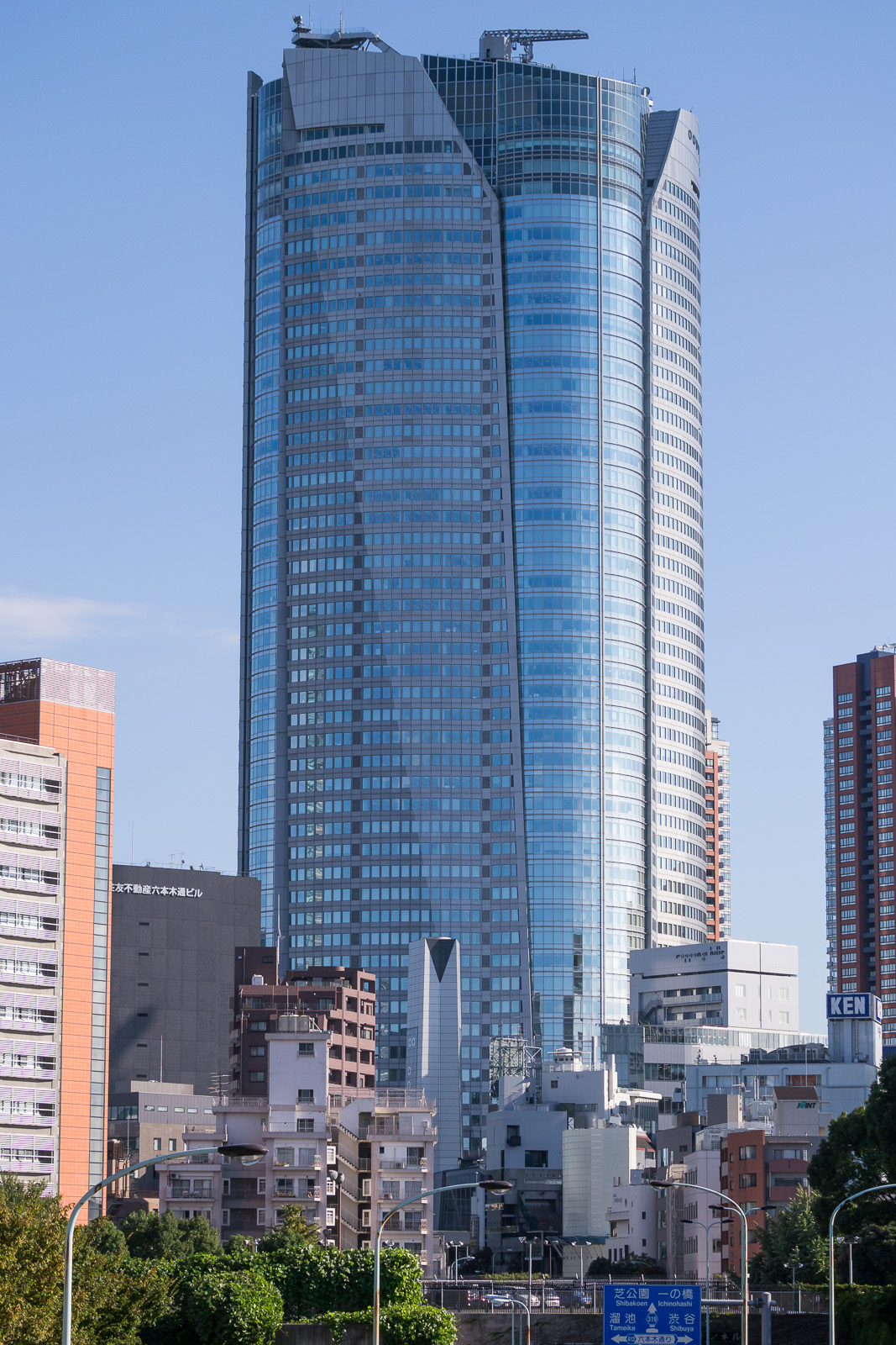 六本木ヒルズ森タワー、東京都港区六本木。